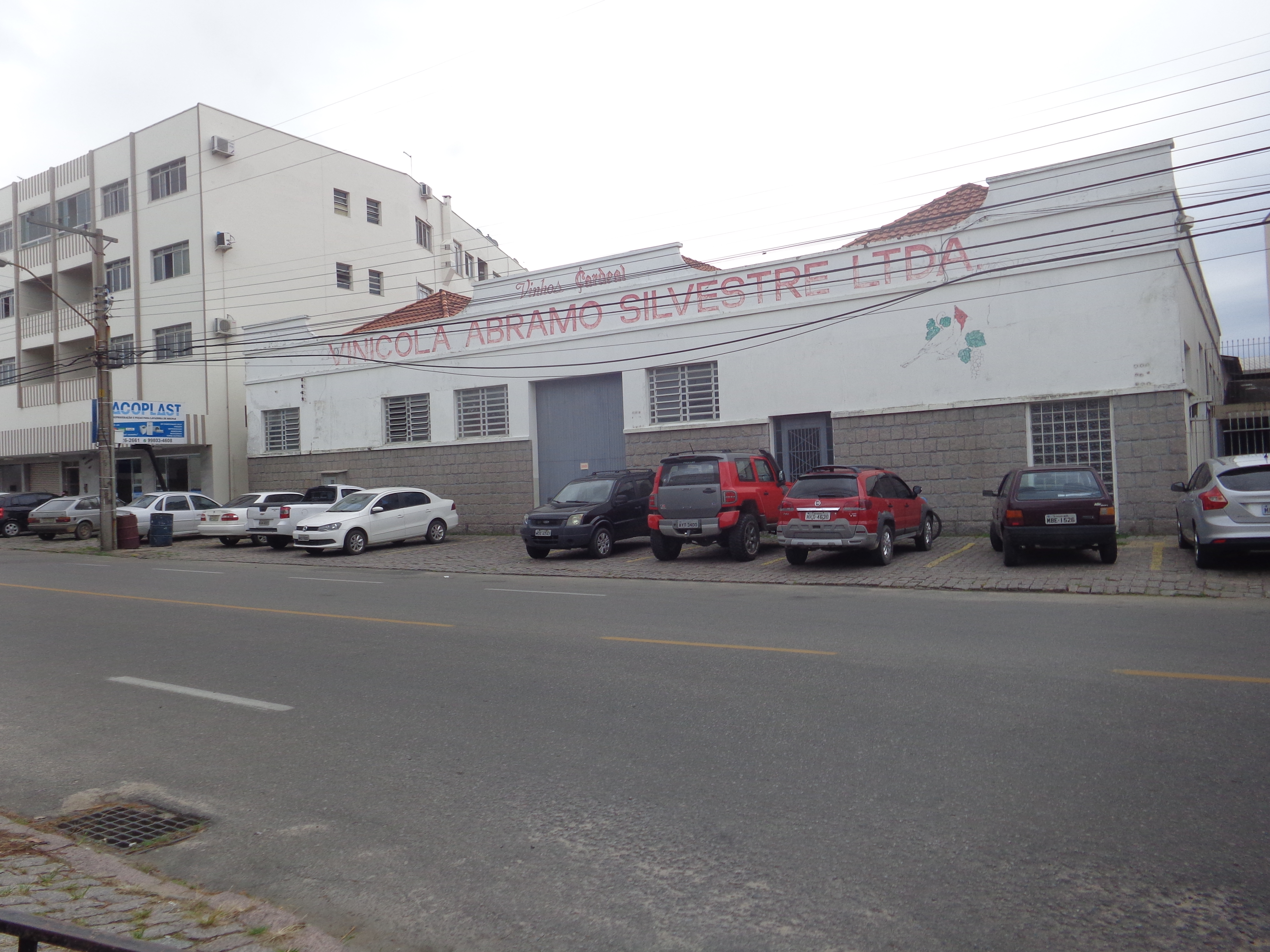 Fotografia do Vinhos Cardeal de Abramo Silvestre em 15 de fevereiro de 2018